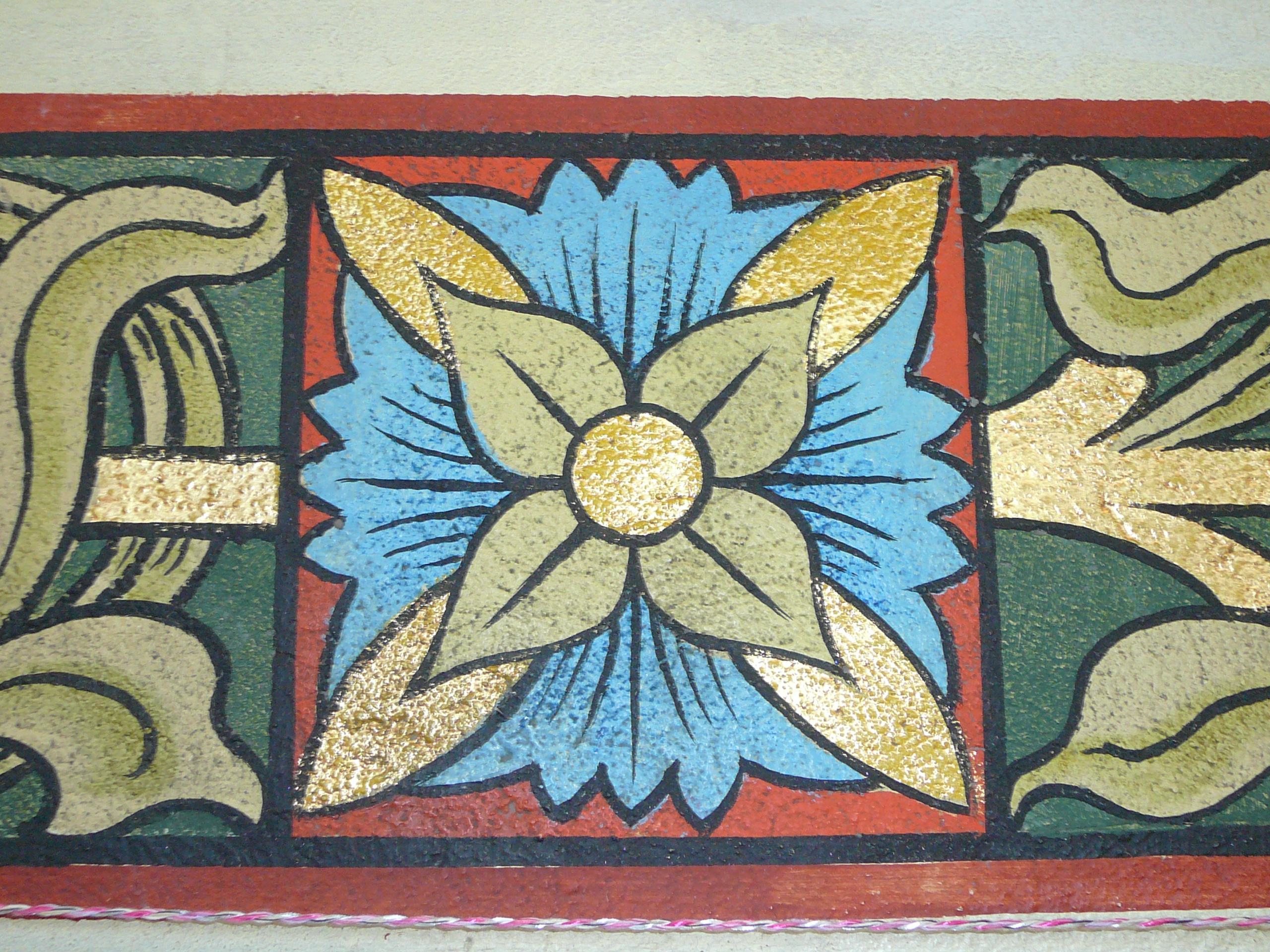 Dreifaltigkeitskirche Bülach Blick, Bemalung von 1909